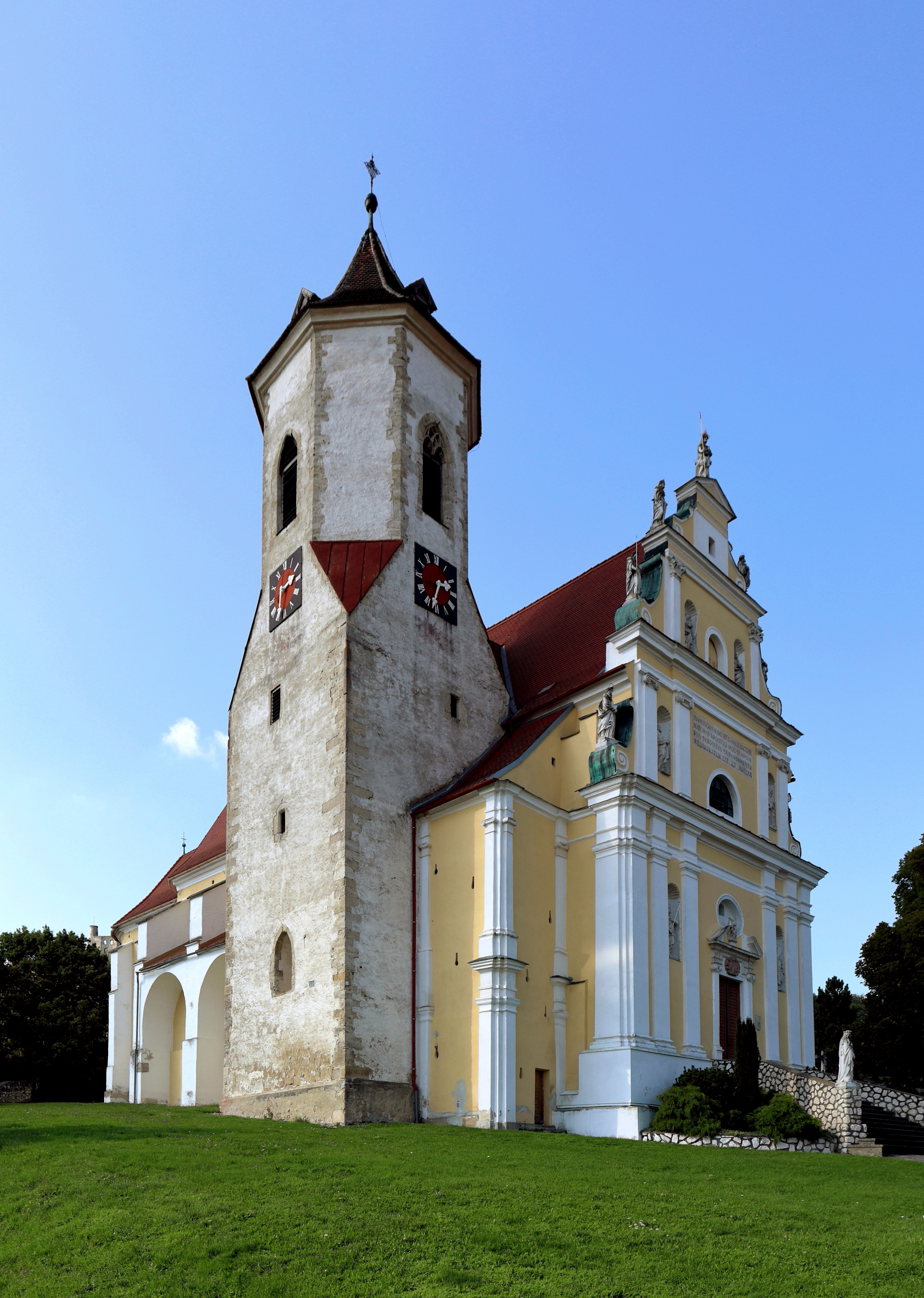 Südostansicht der röm.-kath. Pfarrkirche hl. Jakobus d. Ä. in der niederösterreichischen Marktgemeinde Falkenstein.Der Saalbau mit reich gegliederter Giebelfassade und einem mittelalterlichen Wehrturm (13. Jh.) ist nach Westen ausgerichtet. Um 1670 erfolgte der Neubau der Kirche unter teilweiser Verwendung von Mauerwerk der Vorgängerkirche, beispielsweise der Strebepfeiler des Chores. Die unteren Geschosse des Wehrturmes sind romanisch und das Obergeschoss gotisch.